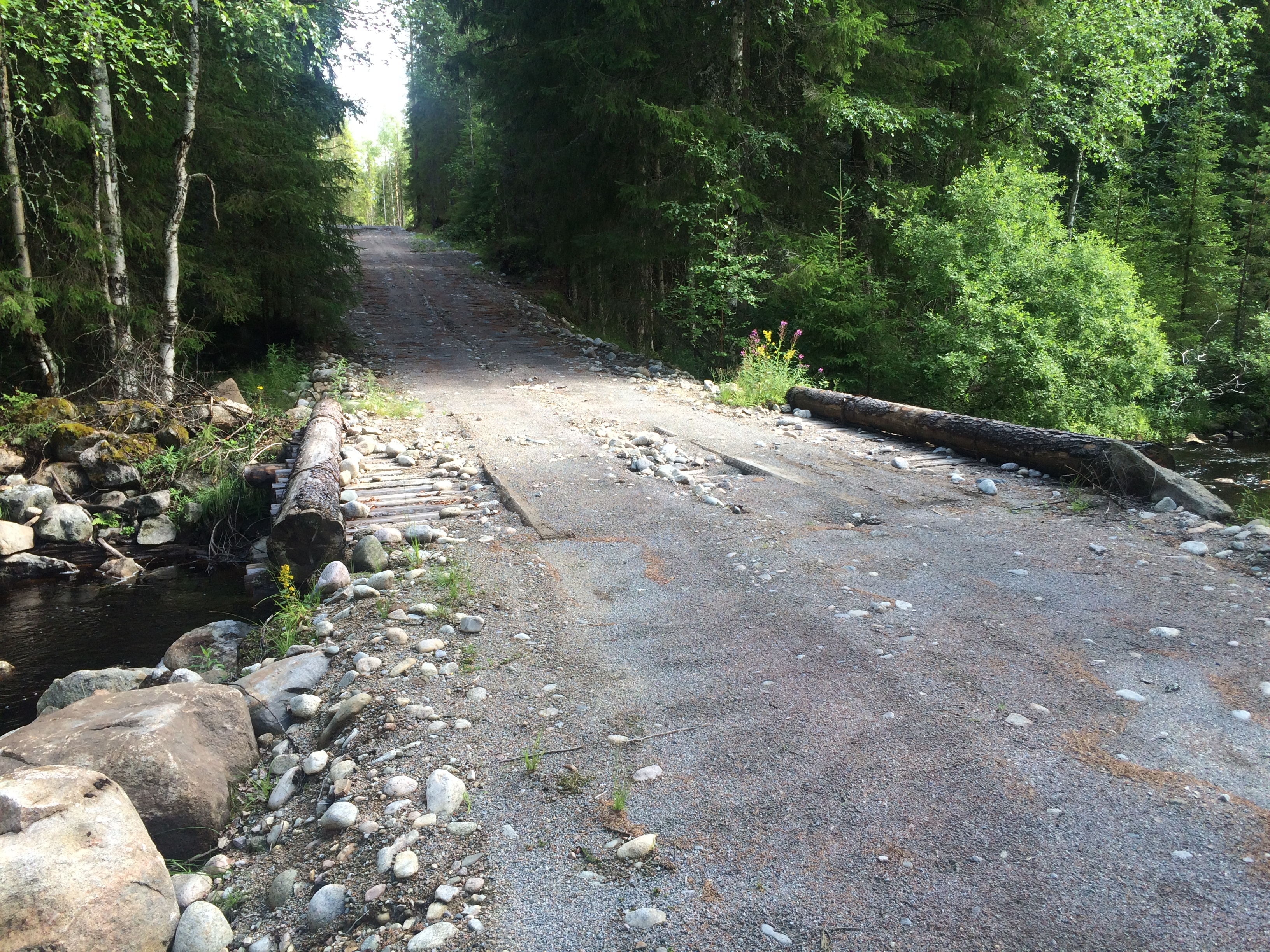 Варисйоки